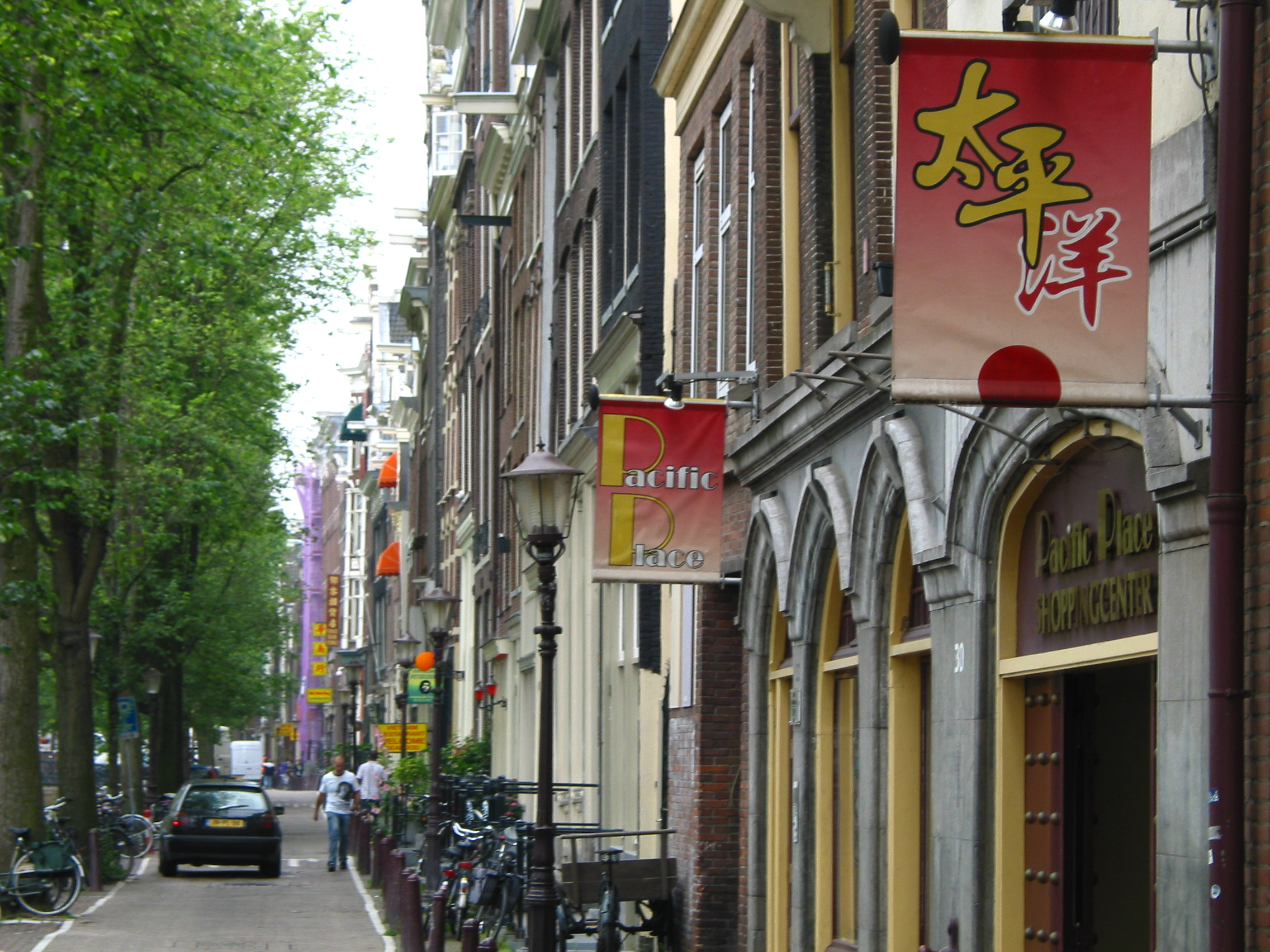 Geldersekade aan de kant met de onevennummers, Amsterdam, Noord-Holland (Chinatown_(Amsterdam))